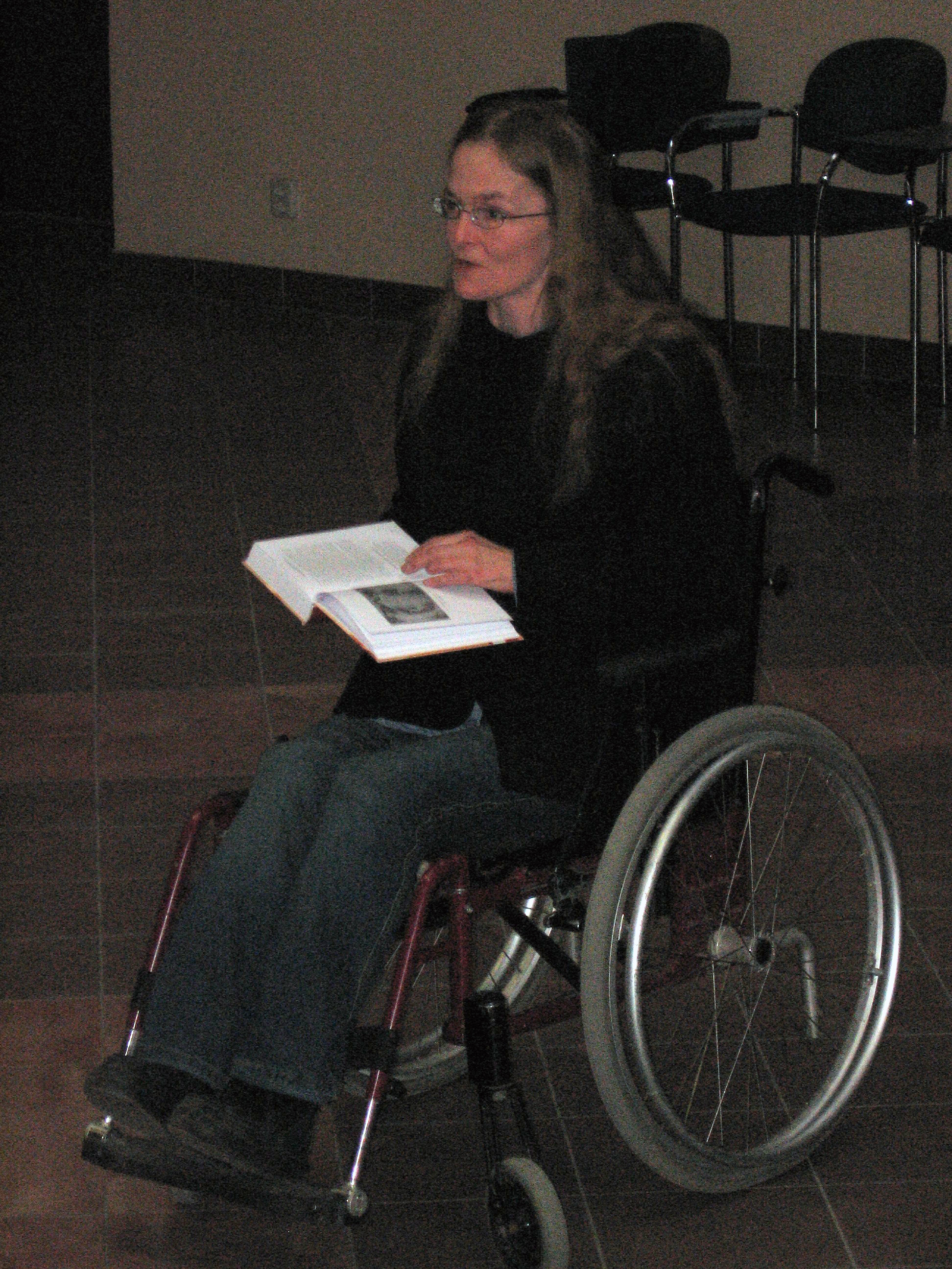 Mari Murdvee "Vanakreeka kirjanduse antoloogia" esitlusel, 19.01.2007 Tartus, Ülikooli 17 fuajees